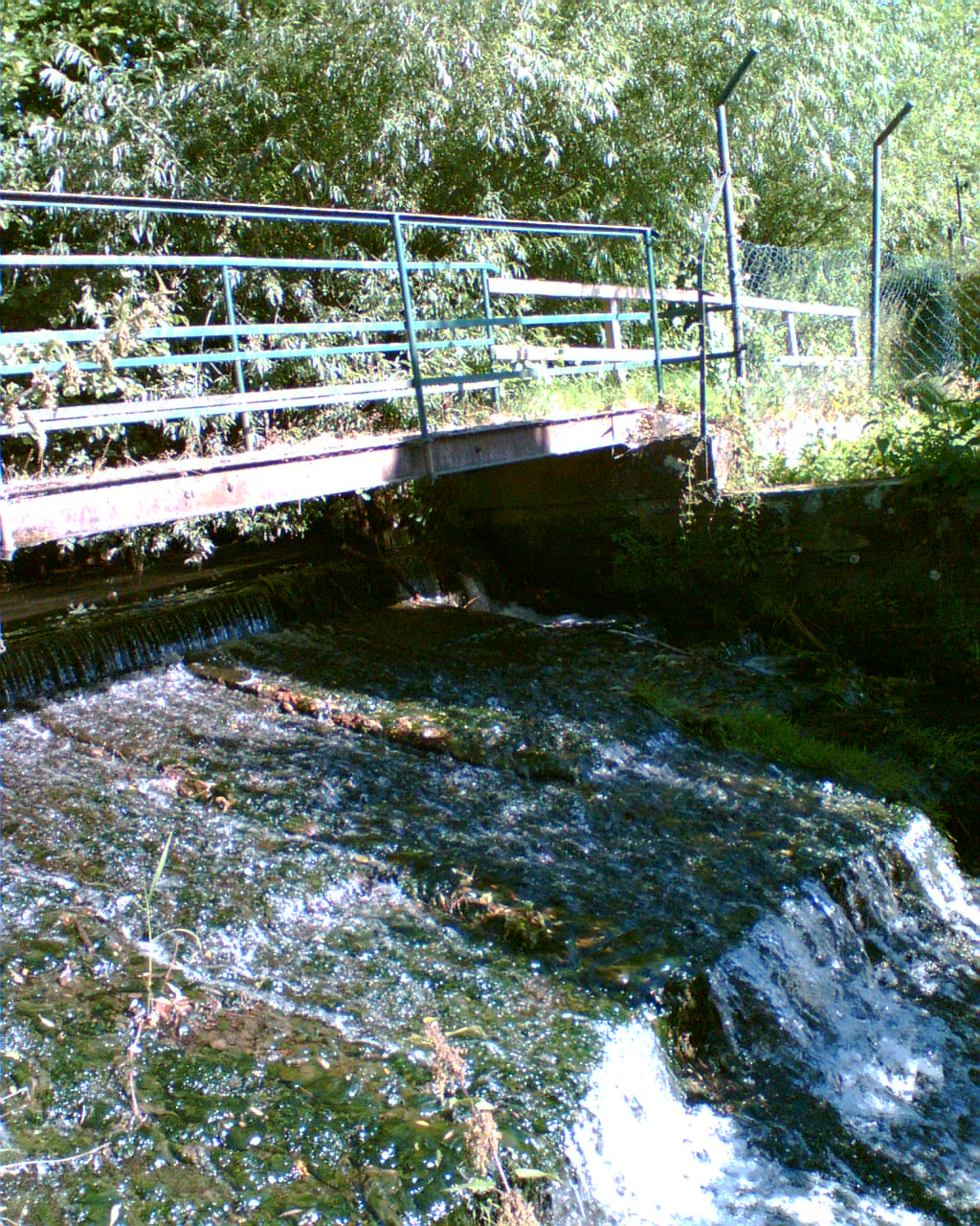 Sturzbach am Freibad Dassel